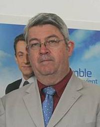 Le député du Var, Philippe Vitel, lors d'une réunion publique à l'occasion des élections municipales à Toulon en mars 2008